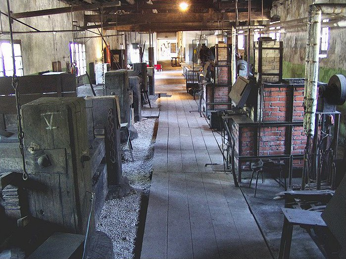 Sensenmuseum Geyerhammer - Schauraum